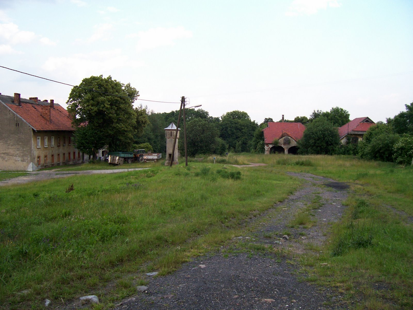 Strzybnik - XIX-wieczna wieża zegarowa.